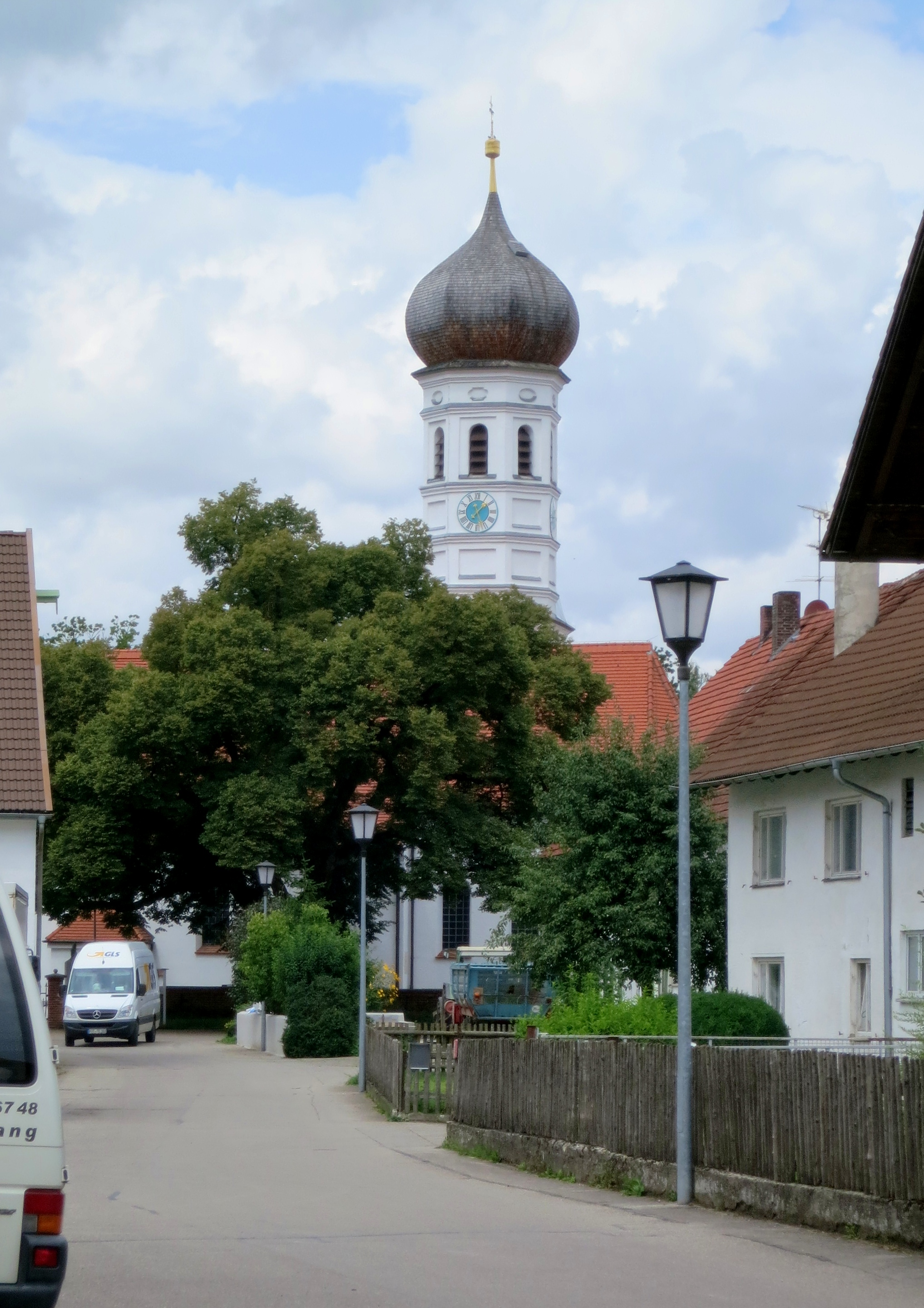 Blick auf St Michael in Jesenwang aus SüdOst, die Kirchstraße entlang